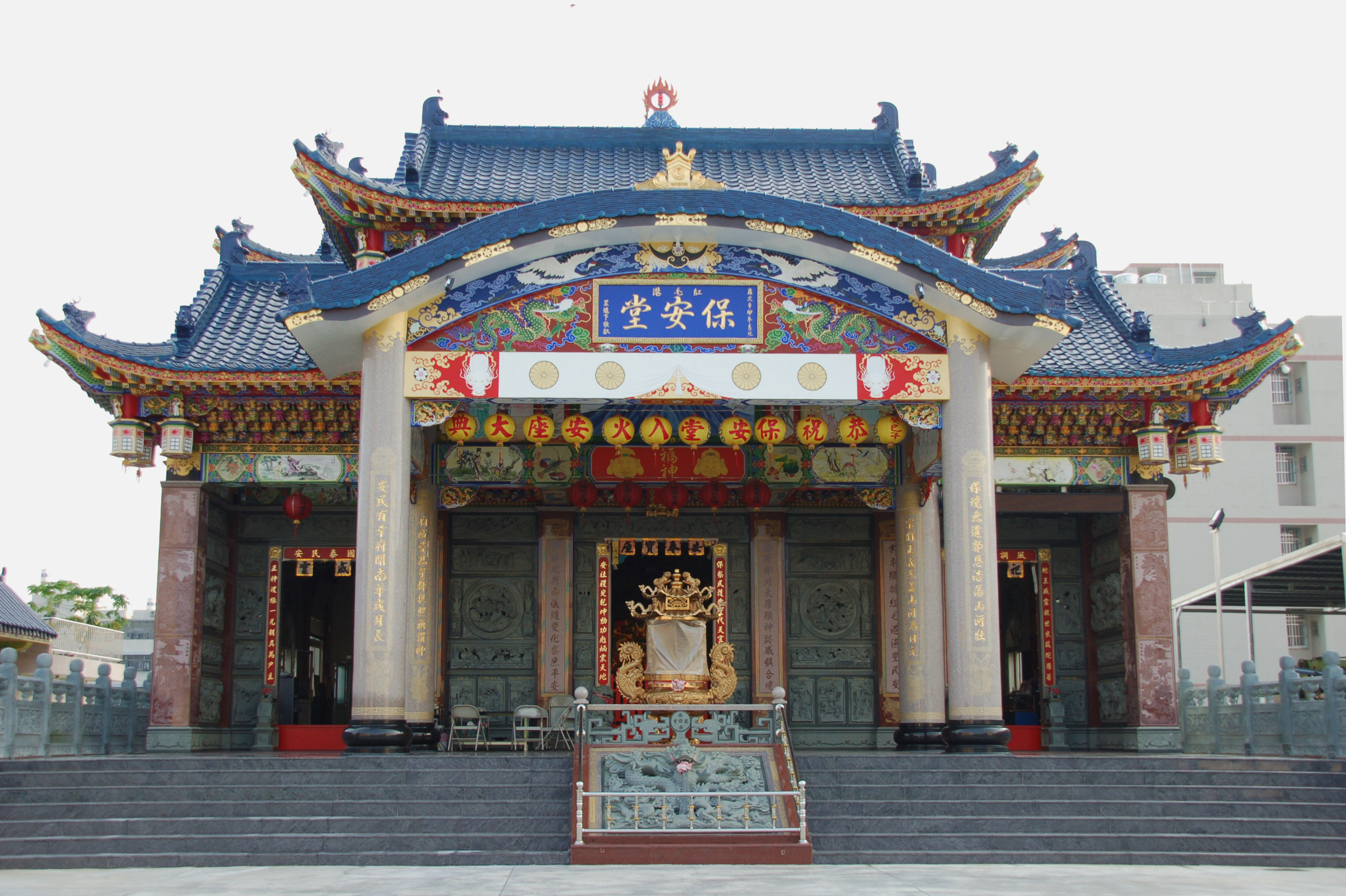 位於高雄市鳳山區國慶七街132號(紅毛港)保安堂，恭奉海府大元帥是日本軍艦艦長。